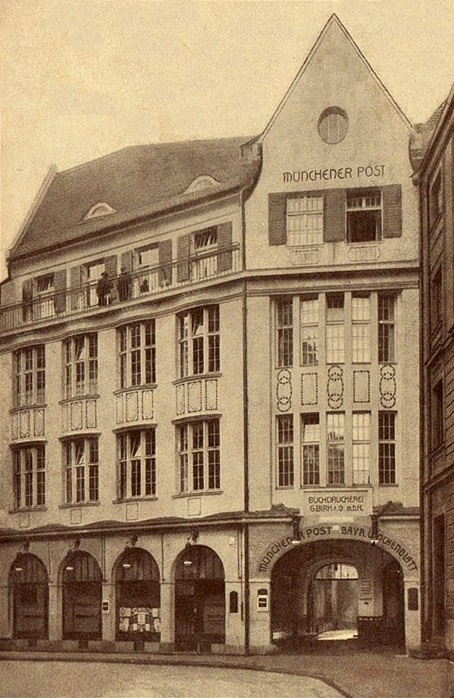 Buchdruckerei und Verlagsanstalt G. Birk & Co.m.b.H. München, Altheimer Eck 18/19.